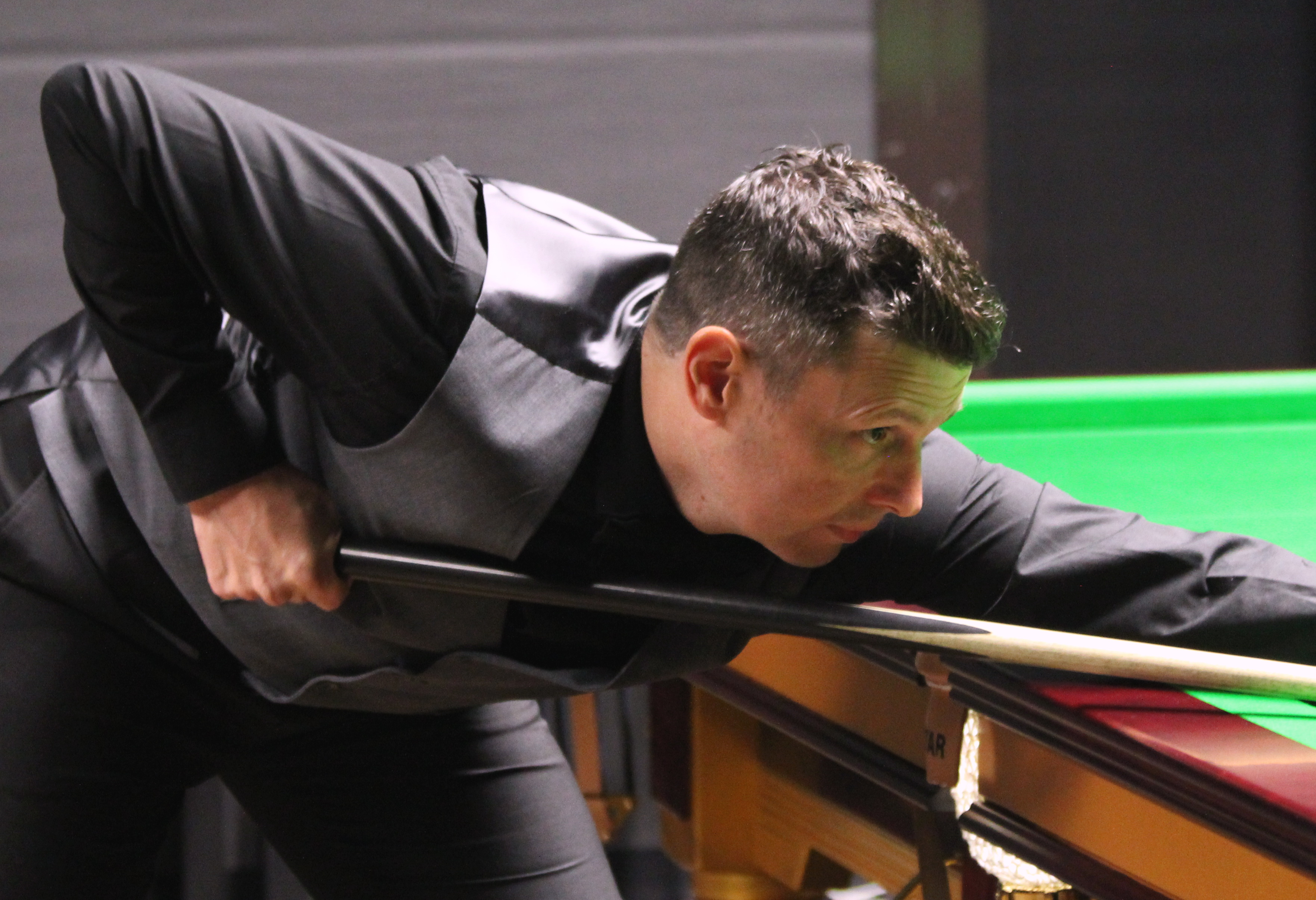 Peter Lines beim Paul Hunter Classic 2016